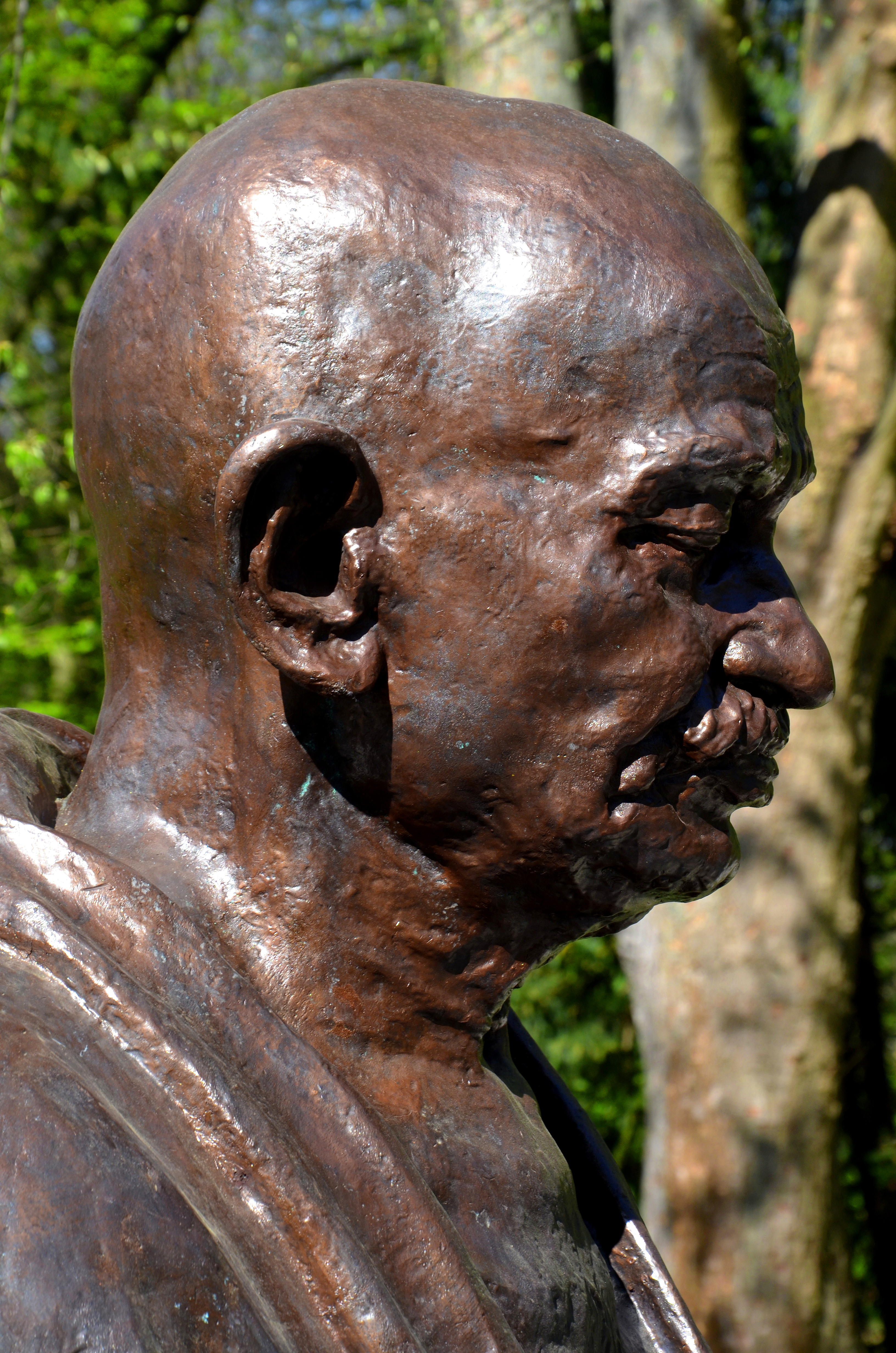 Detail des als Gastgeschenk zur Hannover Messe am 12. April 2015 in Hannover durch Indiens Premierminister Narendra Modi enthüllten Denkmals für Mohandas Karamchand Gandhi, genannt Mahatma Gandhi ...